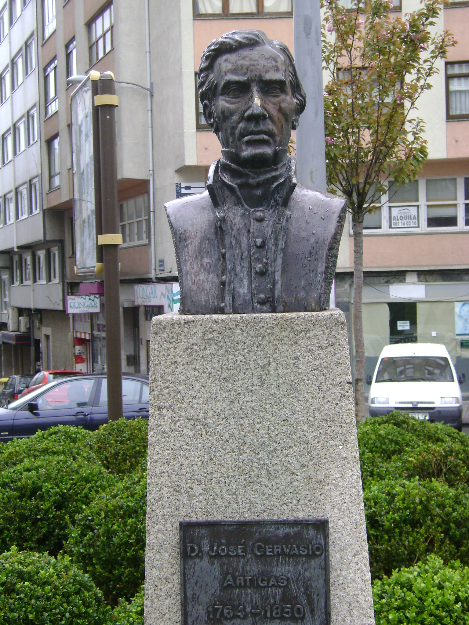 Agra del Orzán, La Coruña, España